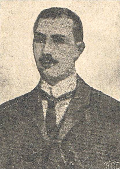 Baruch Szulman członek OB PPS